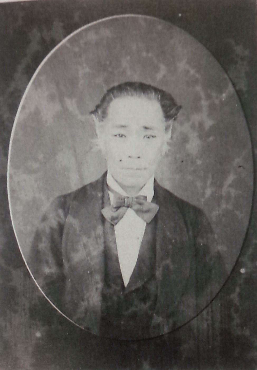 愛宕通致の肖像写真。